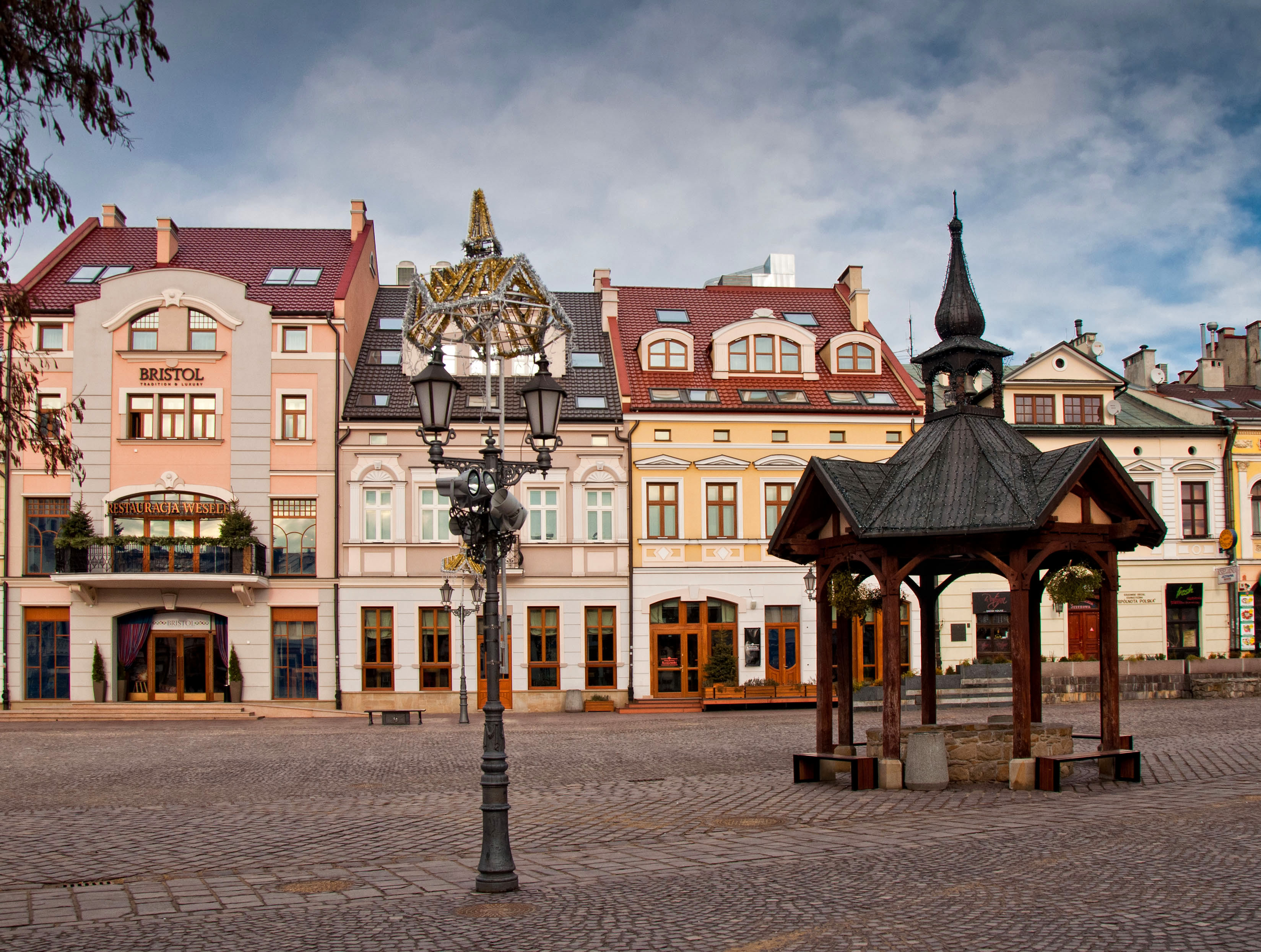 Rzeszów, zespół urbanistyczny średniowiecznego miasta i nowego miasta, 1354, XVIII, XX